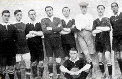 Club Atlético Independiente equipo de 1912